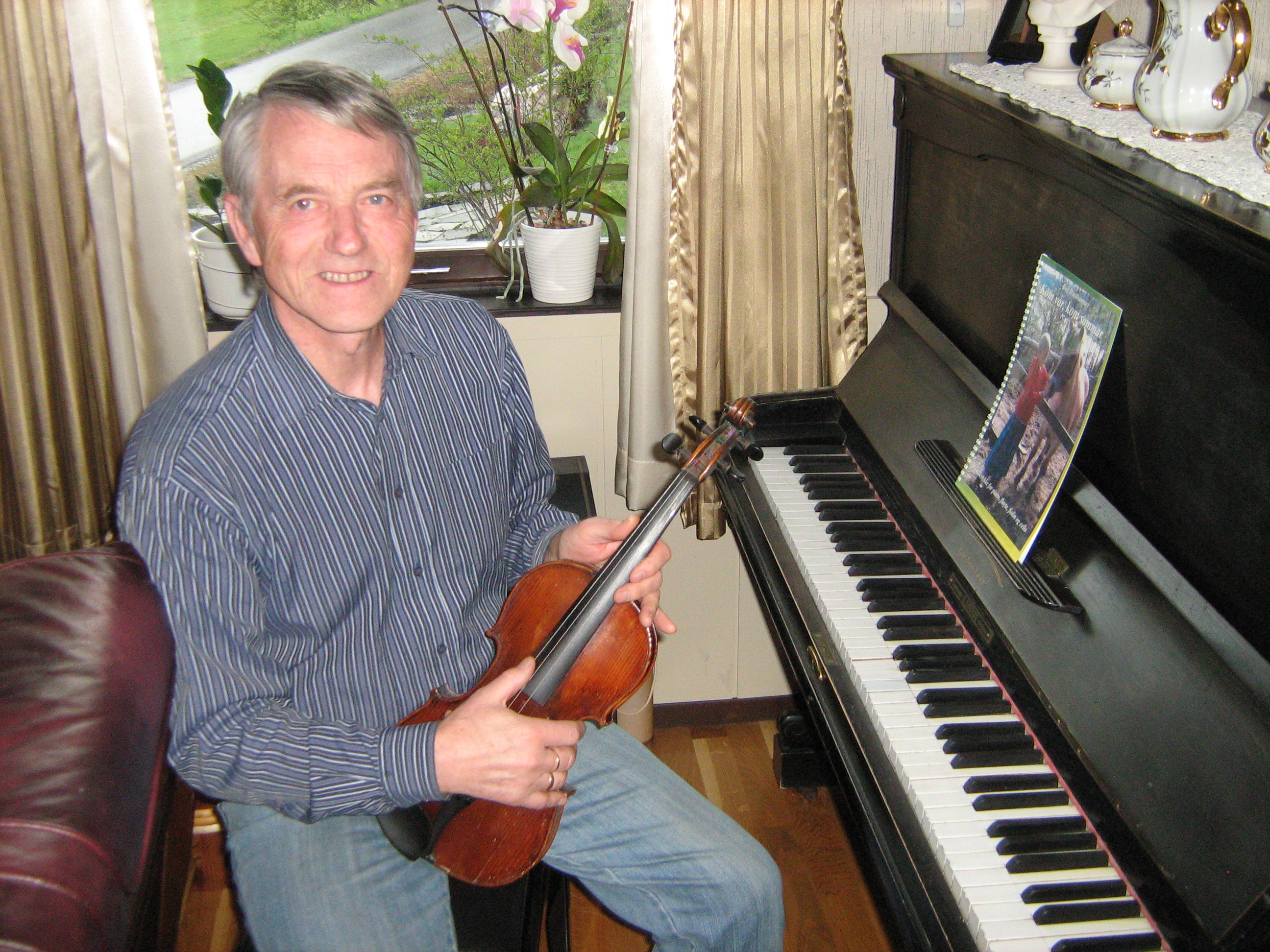 Rolf Hindhammer med to av sine instrument